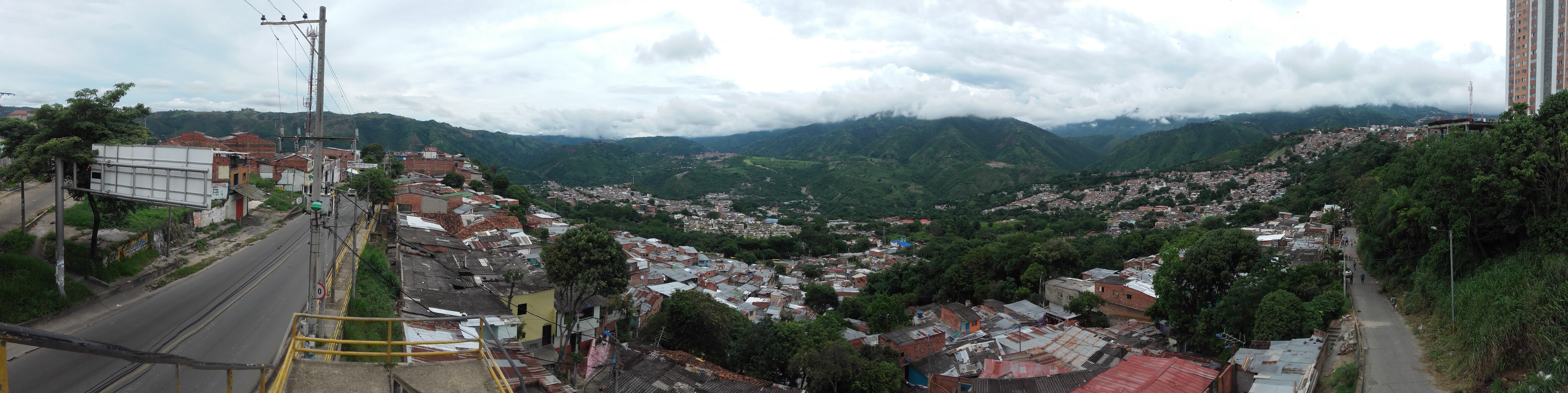 comunas